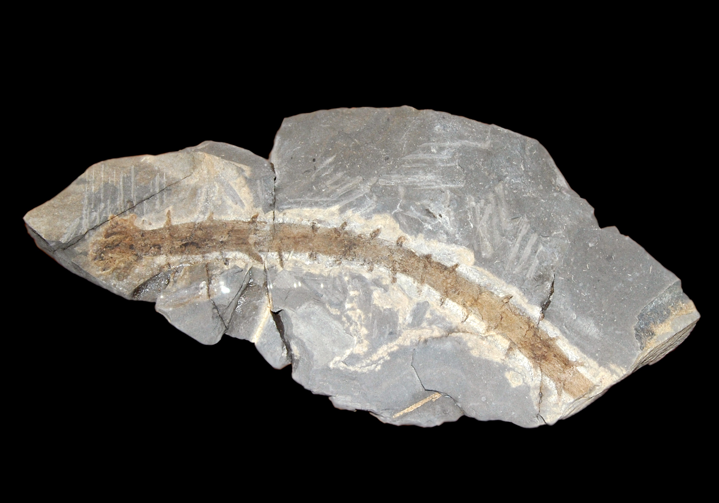 Naturhistorisches Museum Wien